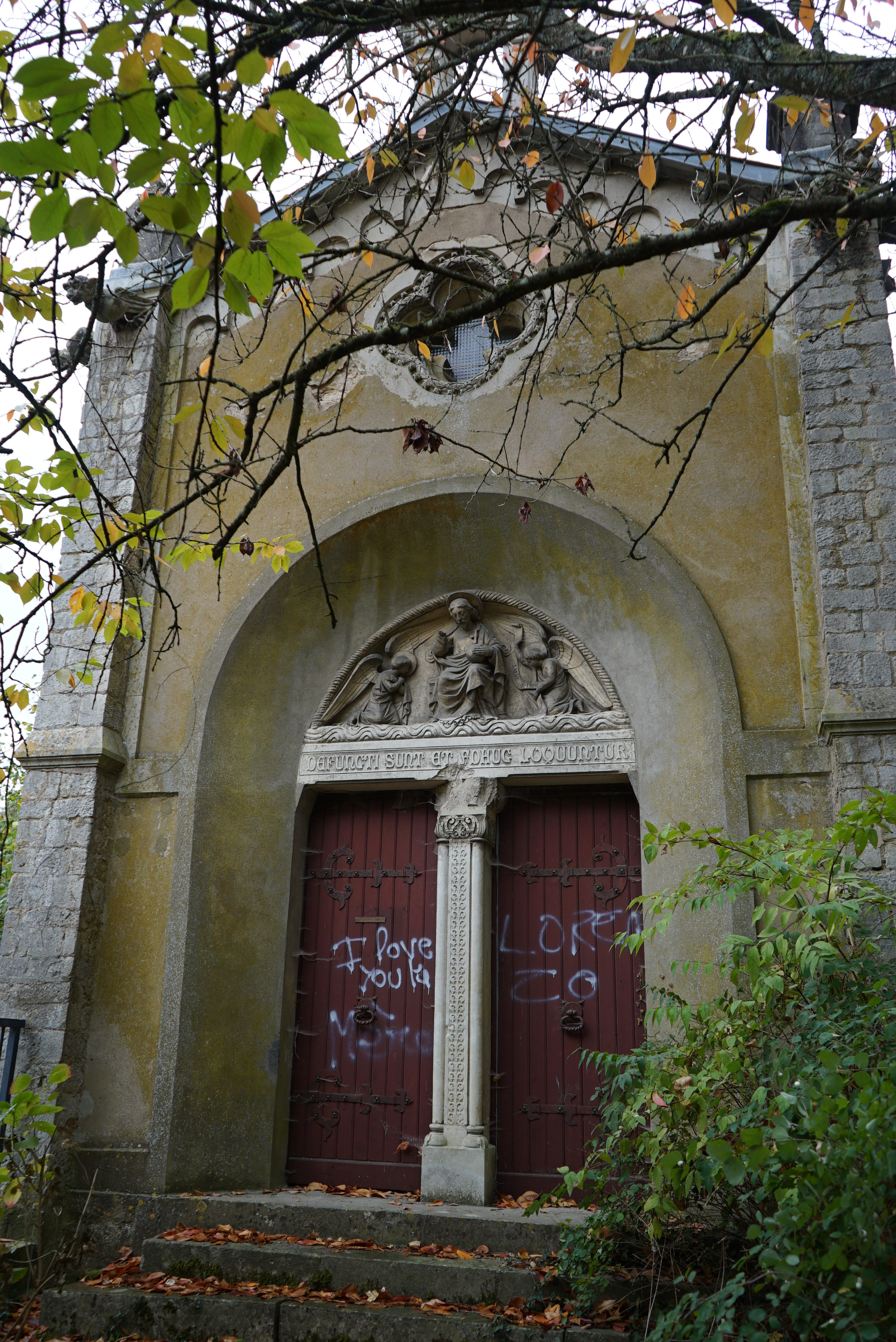 du Château de Rémicourt à Villers-les-Nancy.